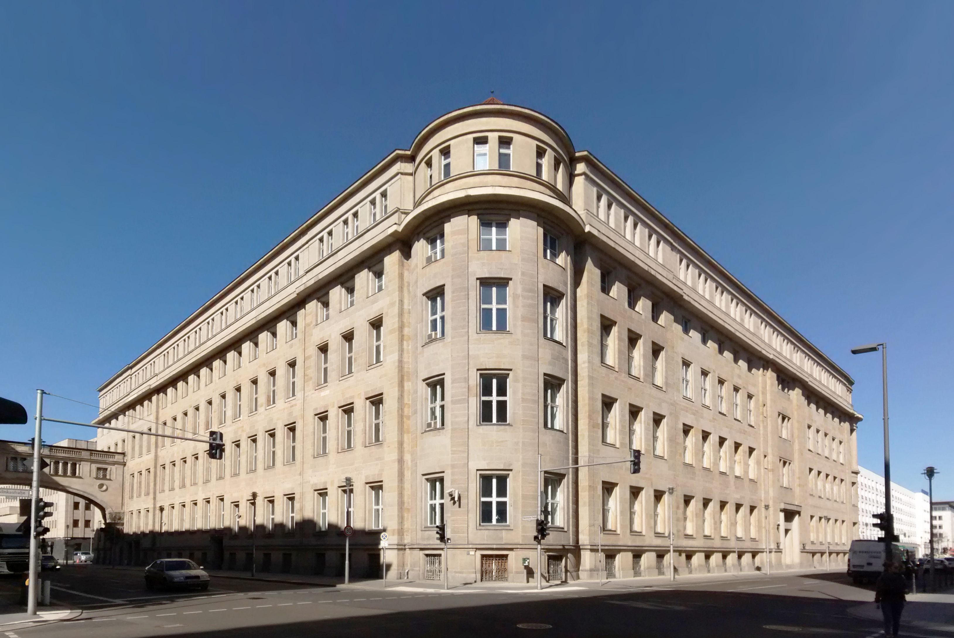 Ehemaliger Gebäudekomplex der Deutschen Bank, Block 1, Französische Straße Ecke Glinkastraße, Berlin-Mitte, Apr. 2016